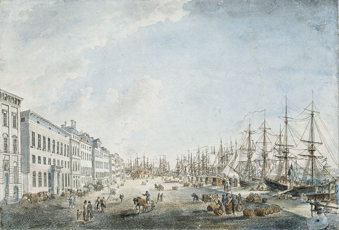 Skeppsbron, Stockholmlabel QS:Len,"Skeppsbron, Stockholm" label QS:Lsv,"Utsigt af Stockholm från Skeppsbron"